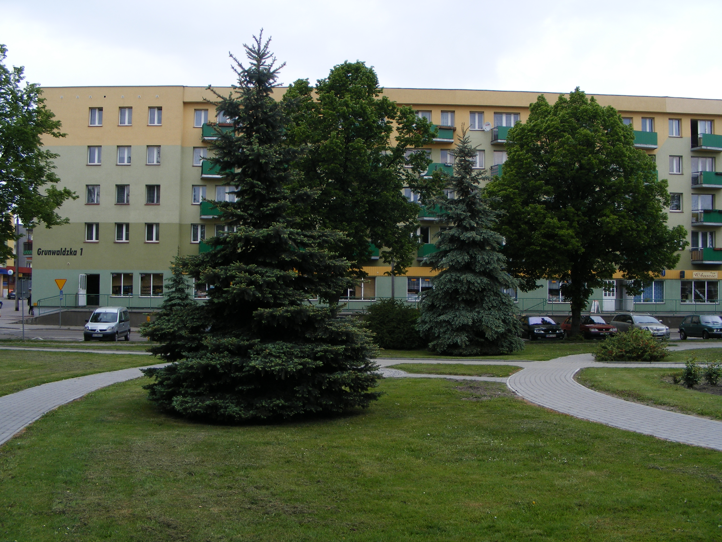 Piękny Skwer przy ul.Grunwaldzkiej.